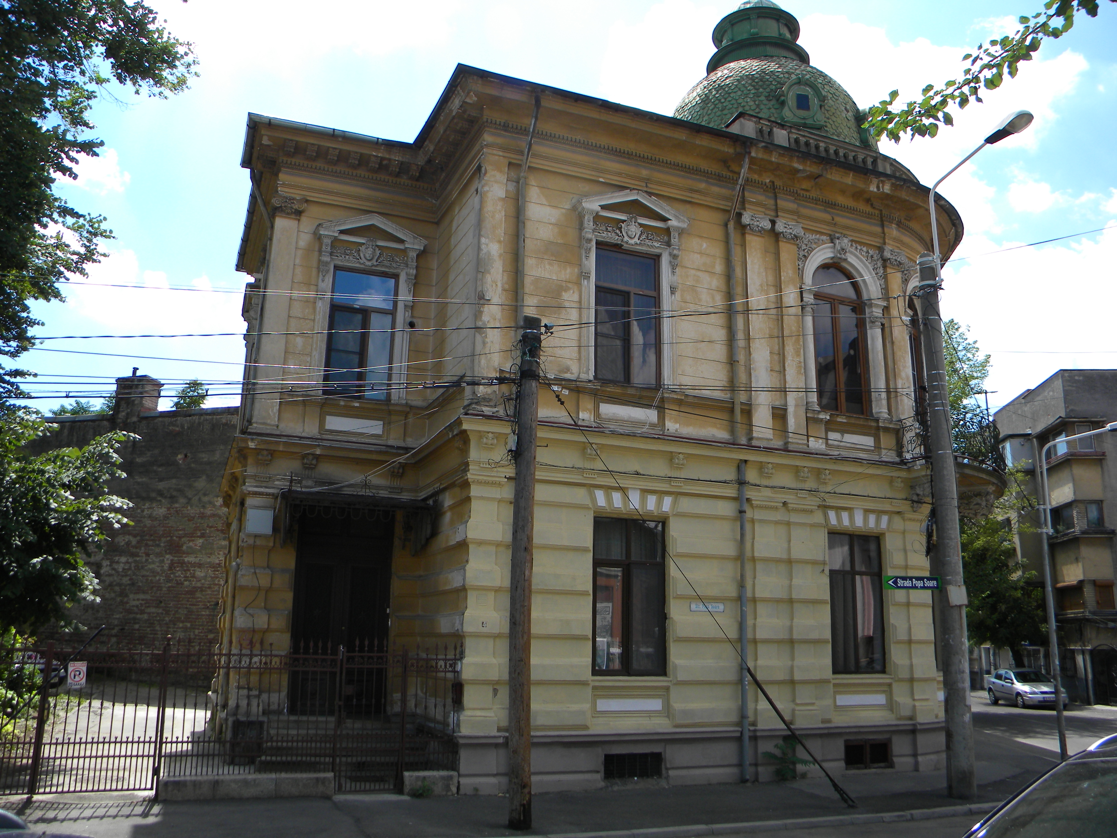 Bucuresti, Romania. Casa pe Str. Popa Soare nr. 4, sect. 3. B-II-m-B-19454